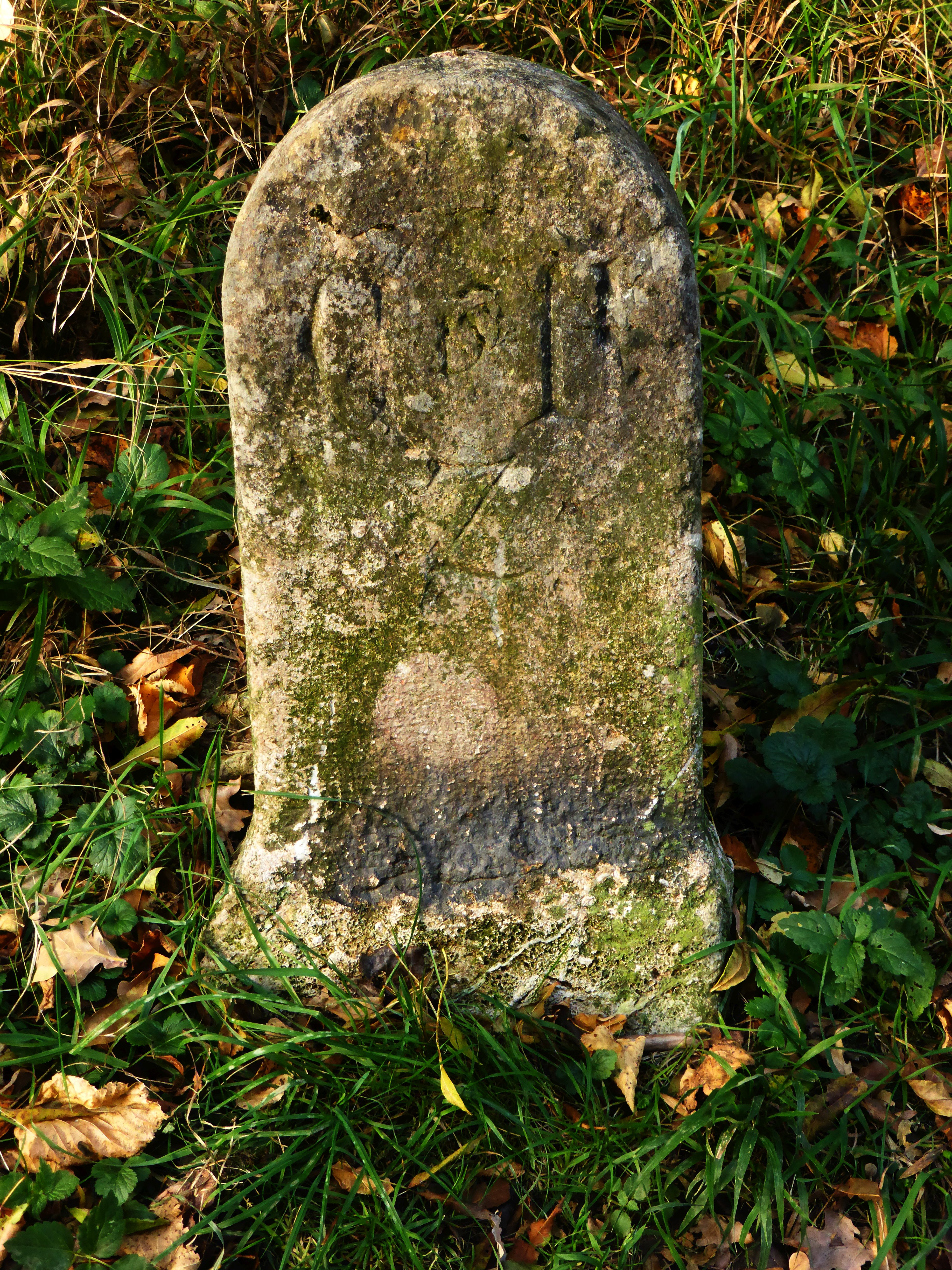 Grenzstein auf der Karolinenhöhe (Inschrift unleserlich)